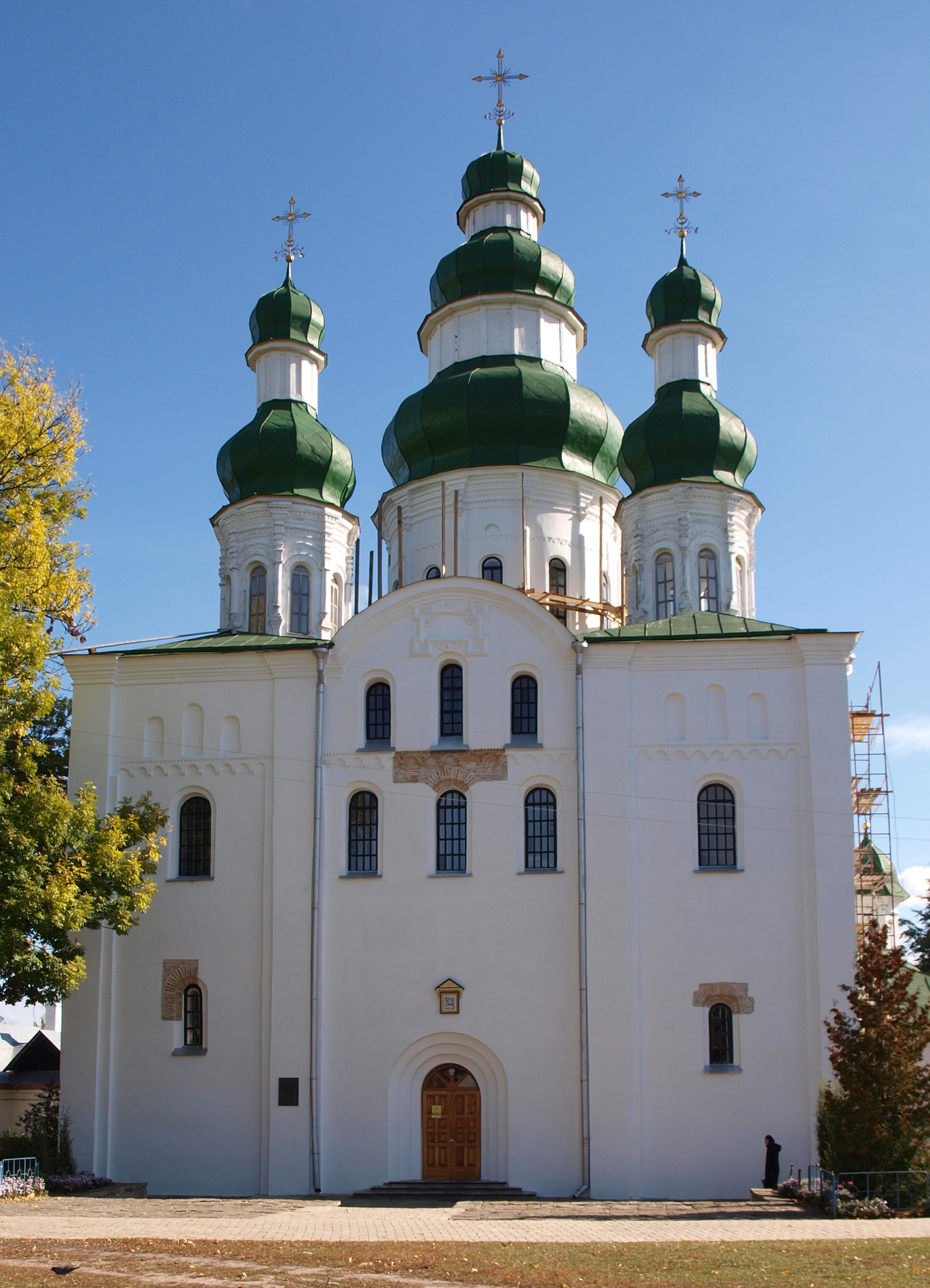 Елецкий монастырь (Чернигов) Успенский собор